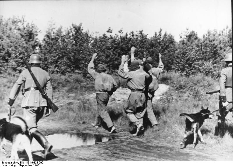 Russland, Gefangennahme von Partisanen ADN-ZB II. Weltkrieg 1939-1945 Sowjetunion Sowjetische Partisanen werden von Angehörigen einer deutschen Polizei-Einheit in die Gefangenschaft abgeführt. Shitomir, September 1942. [Scherl Bilderdienst] Information added by Wikimedia users.